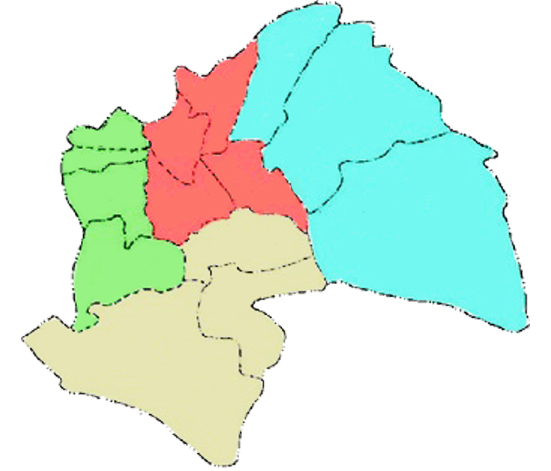 الخارطة الإدارية لمحافظة الديوانية